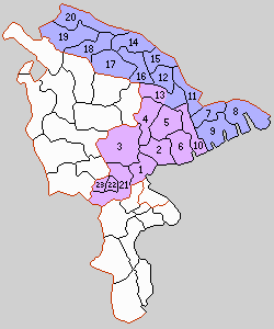 橘樹郡の町村。